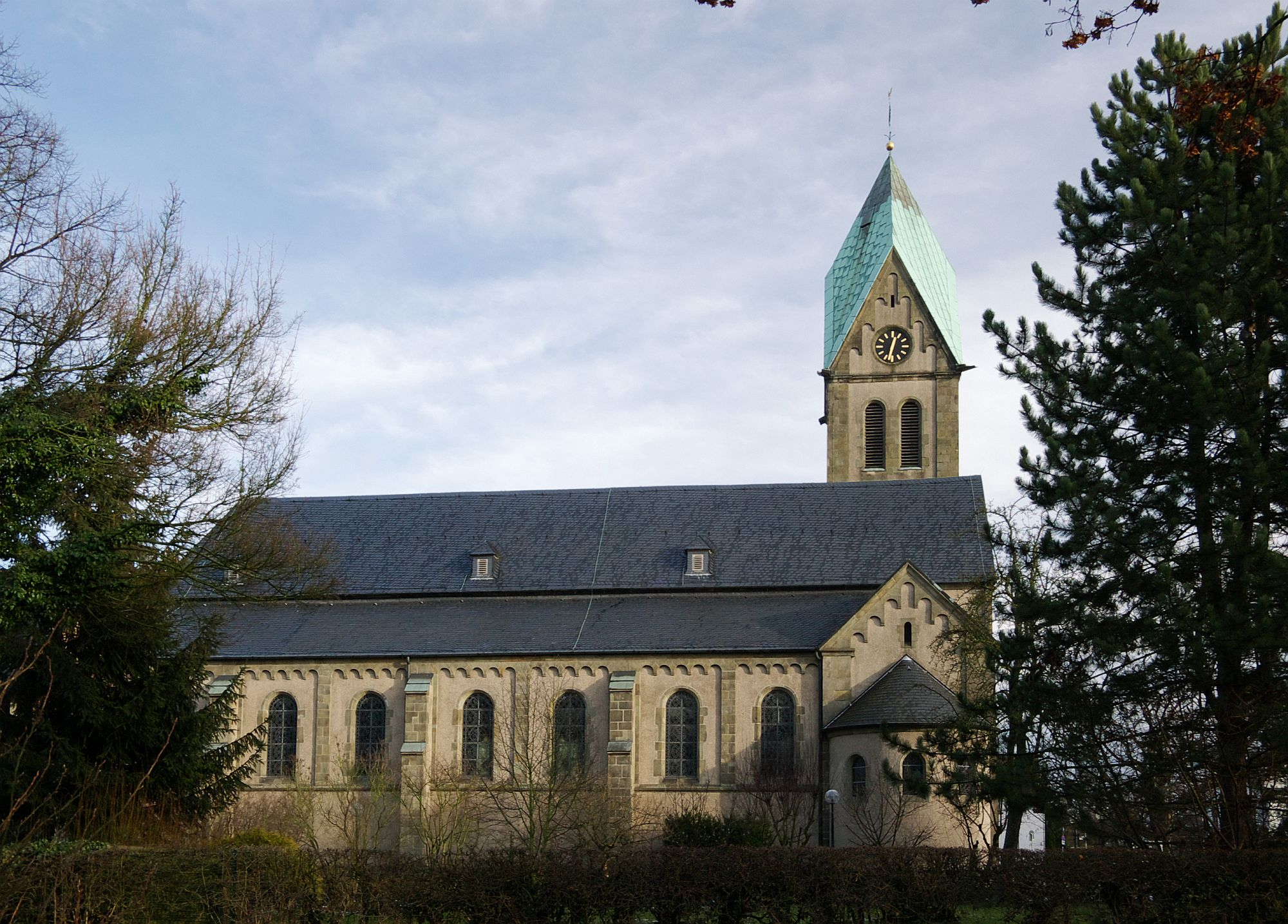 St. Michael, Dortmund-Lanstrop, Nordrhein-Westfalen.